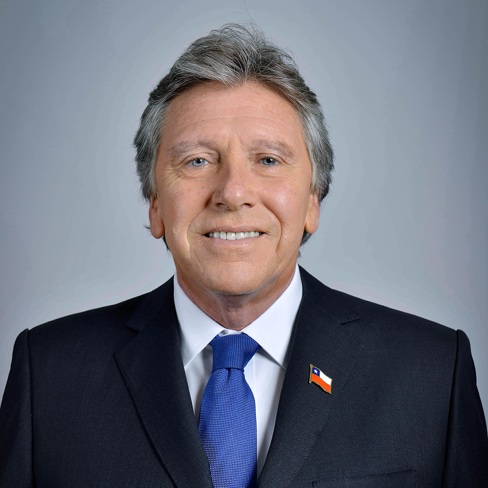 Foto oficial de Alberto Espina como ministro